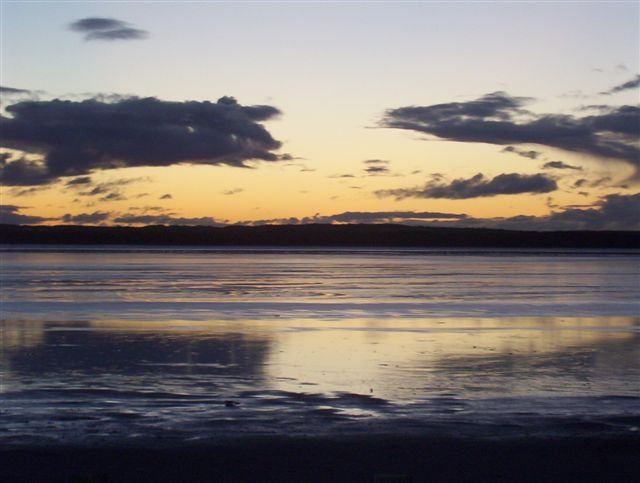 Coucher de soleil sur le lac rose, près d'Esperance en Australie occidentale